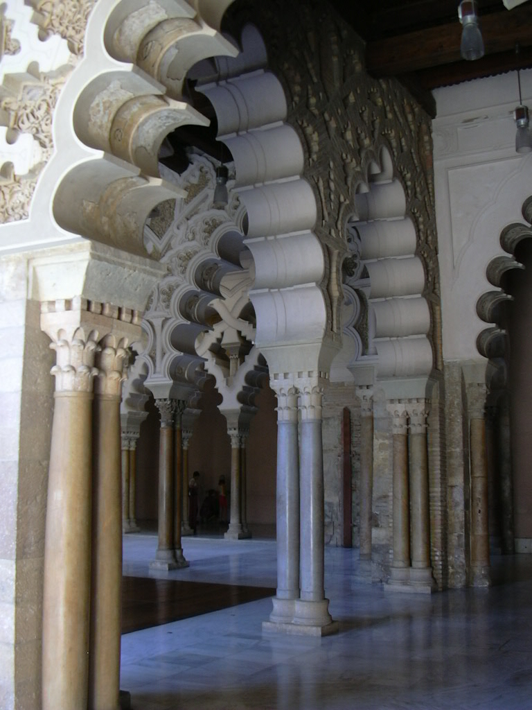 La Aljafería - Palacio taifa